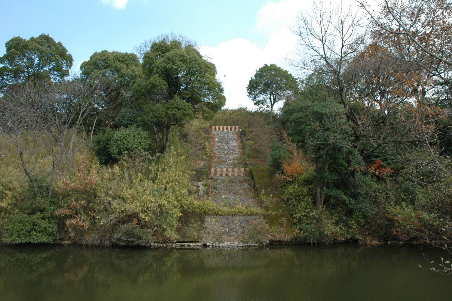 投稿者が撮影 Kurohimeyama Kofun, Sakai, Osaka, Japan